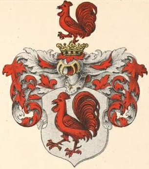 Hahni suguvõsa parunivapp